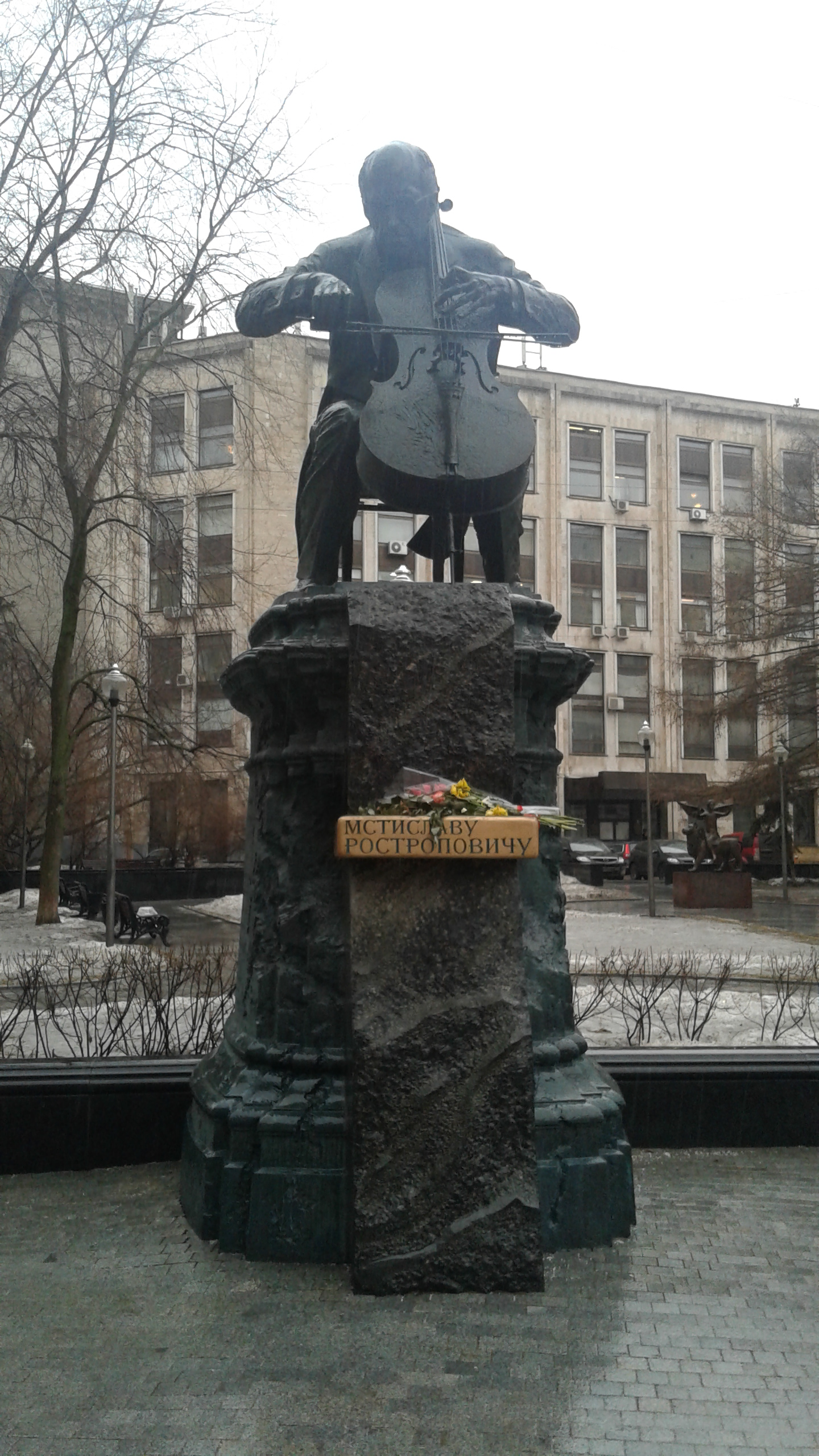 Памятник Мстиславу Ростроповичу в сквере его имени в Брюсовом переулке в Москве